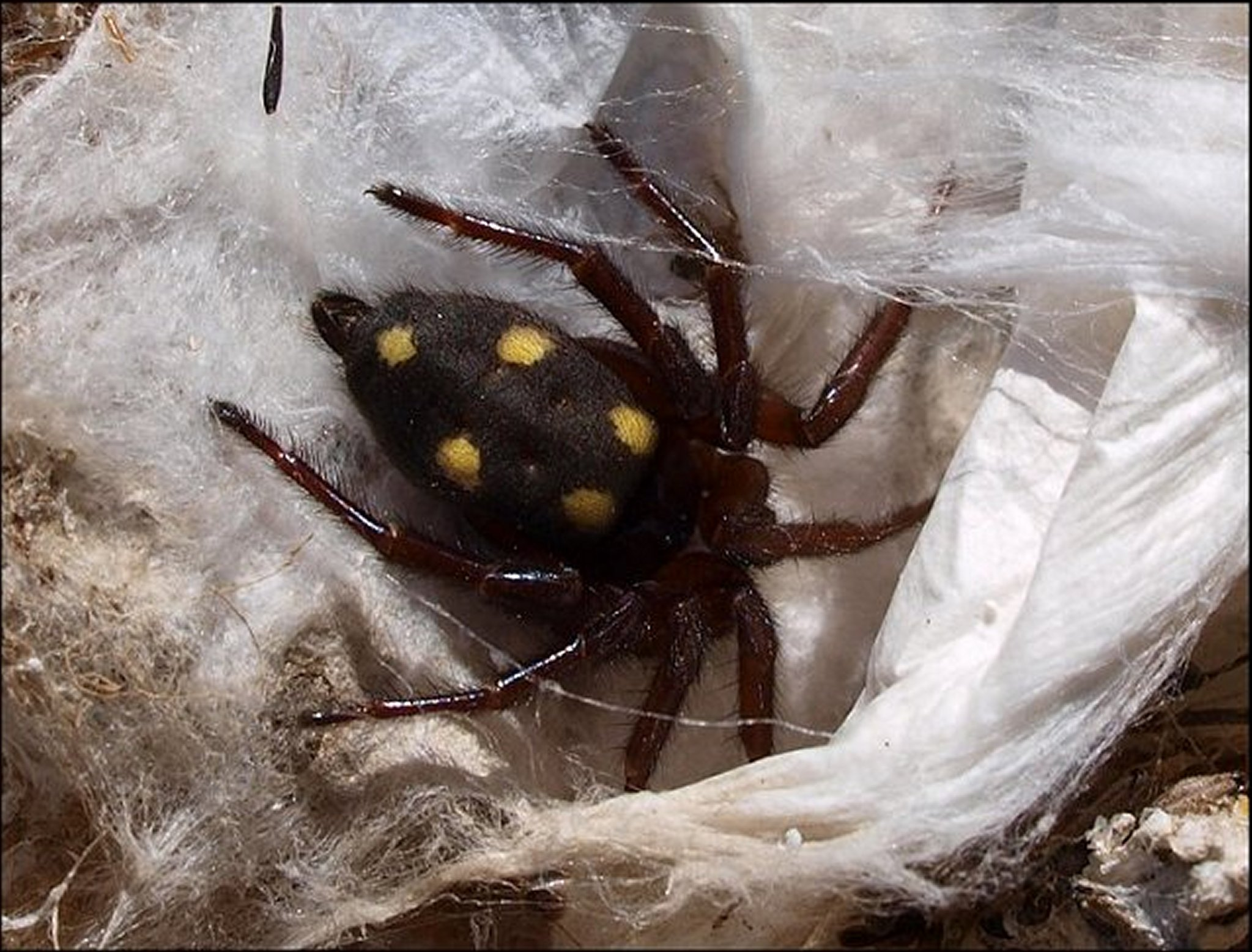 Uroctea durandi : femelle dans sa toile ouverte.Vue des différentes couches de soie. Garrigue du Saint-Chinianais, Occitanie.